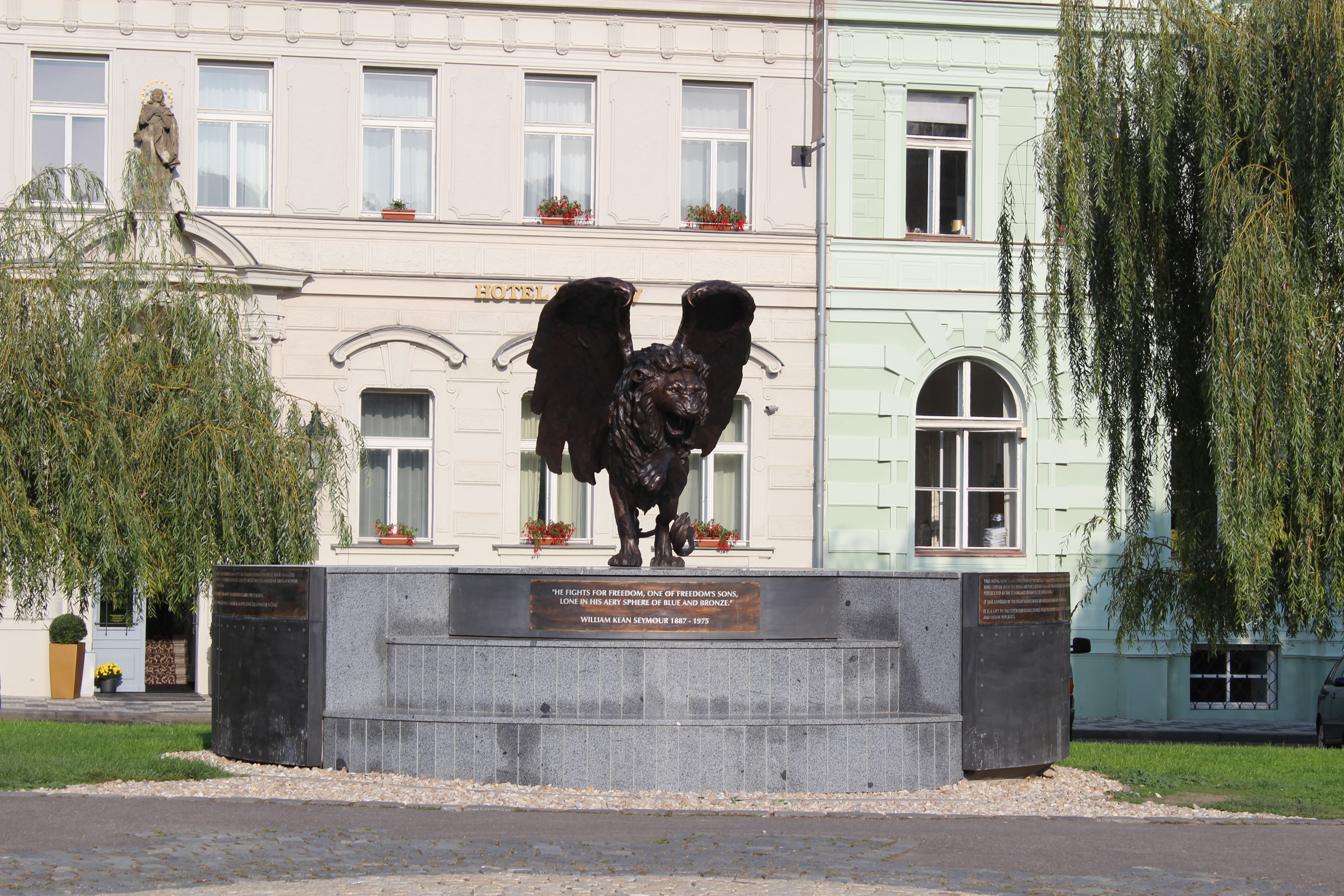 V Praze na Klárově byl 17. 6. 2014 odhalen pomník 2.500 československých letců, kteří za II. světové války sloužili v královském letectvu ve Velké Británii. Pomník je darem britské komunity, která žije a pracuje v České republice a Slovenské republice. Autorem památníku je britský sochař Colin Spofforth. Bronzový okřídlený lev stojí na podstavci s kovovými nýtovanými plechy evokujícími plášť letadla. Na přední části podstavce je anglický nápis: „HE FIGHTS FOR FREEDOOM, ONE OF FREEDOOM´S SONS, LONE IN HIS AERY SPHERE OF BLUE AND BRONZE.“ WILLIAM KEAN SEYMOUR 1887 – 1975. Na bocích podstavce je česká (vlevo) a anglická dedikace britské komunity, která žije a pracuje v České republice a Slovenské republice.